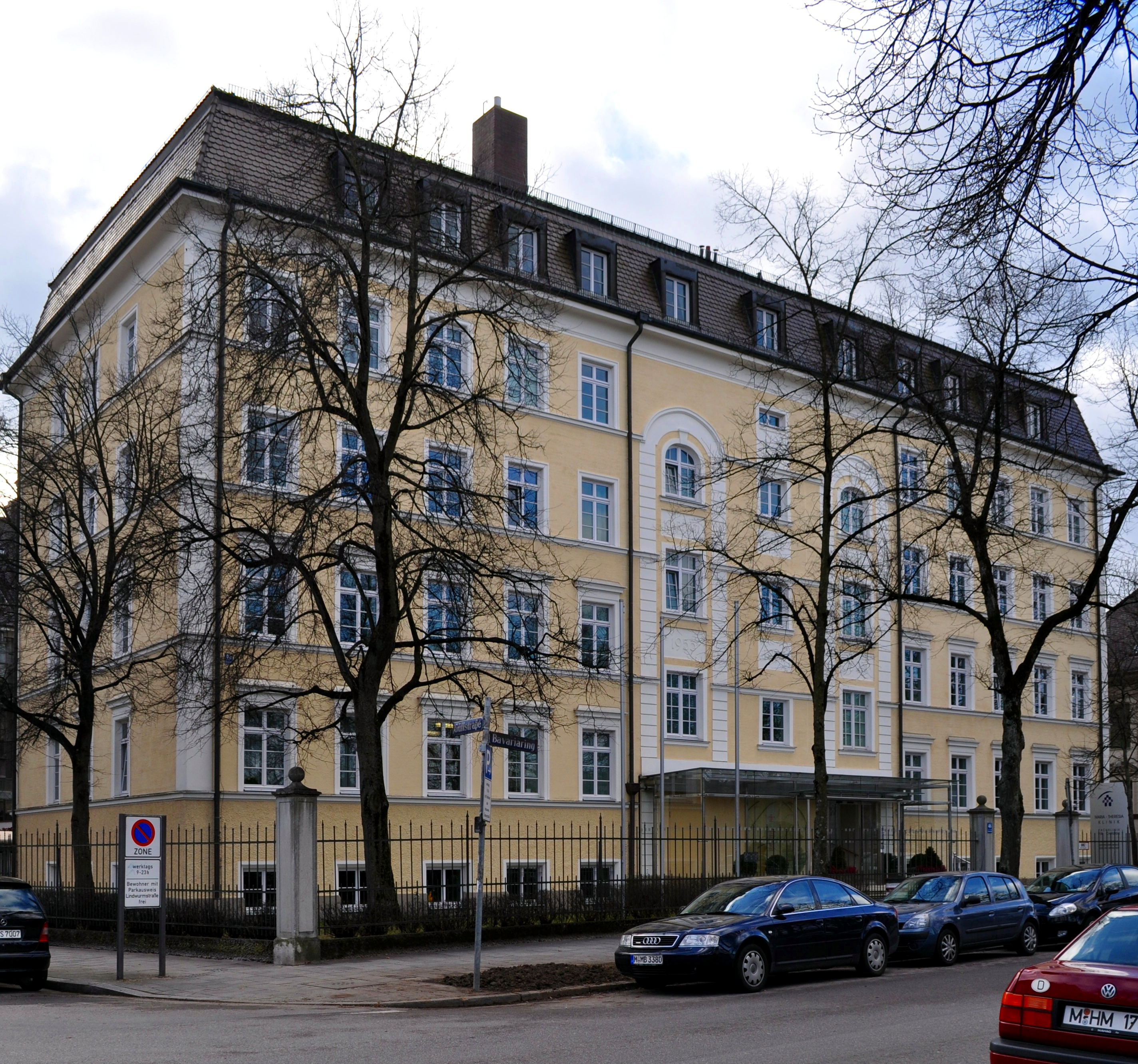 Maria-Theresia-Klinik in München-Ludwigsvorstadt; Bavariaring 46